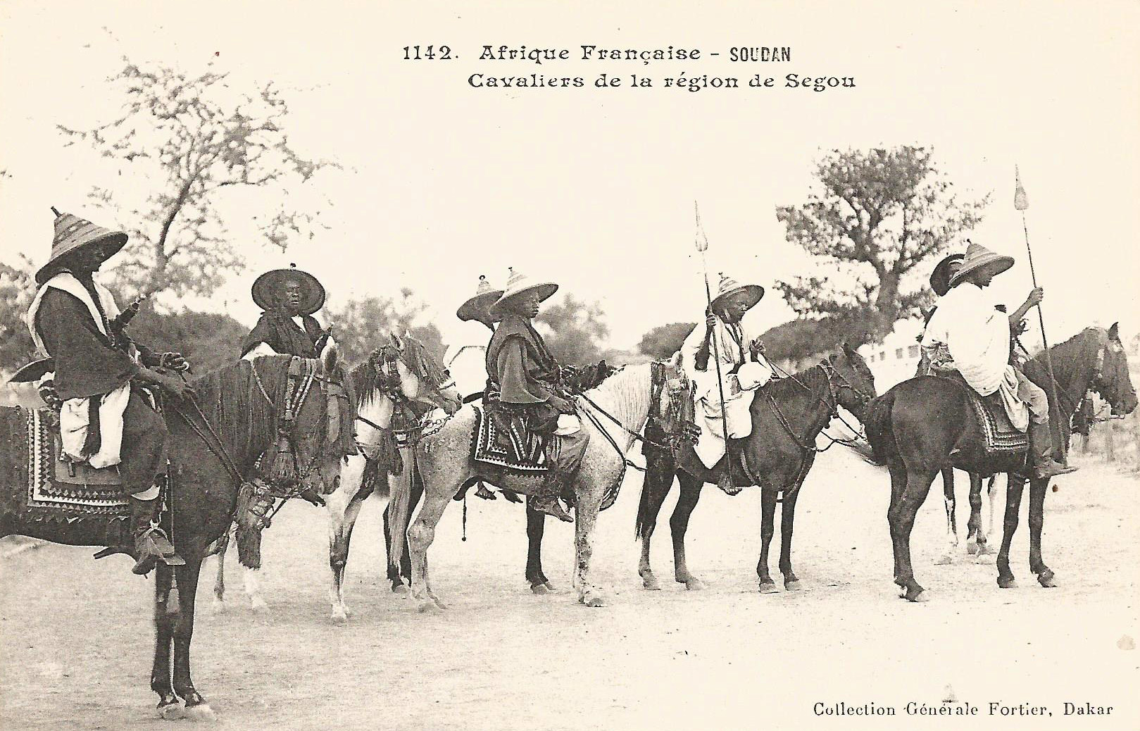 François-Edmond Fortier, Cavaliers de la région de Ségou. Afrique Française - Soudan.